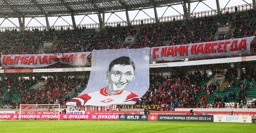 Перфоманс, посвященный памяти Ильи Цымбаларя